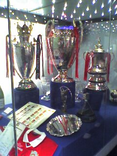 Photo des vitrines de trophées de Manchester United. Cette photo a été prise par Mickaël Roure alias Altrensa pour Wikipédia et ne saurait être utilisée sans mention de son auteur.